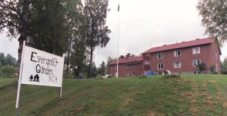 Esperanto-Domo en Lesjöfors (Svedio). Foto de Brion VIBBER, (c) 2003. Eldonas la? GNU FDL.